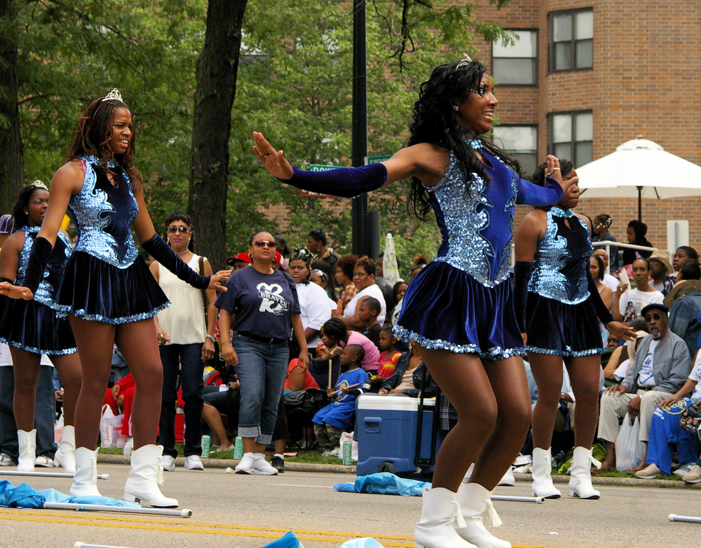 2008 Bud Billiken Parade, Chicago.